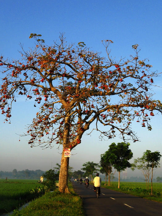 Pohon Jangkang di Indonesia